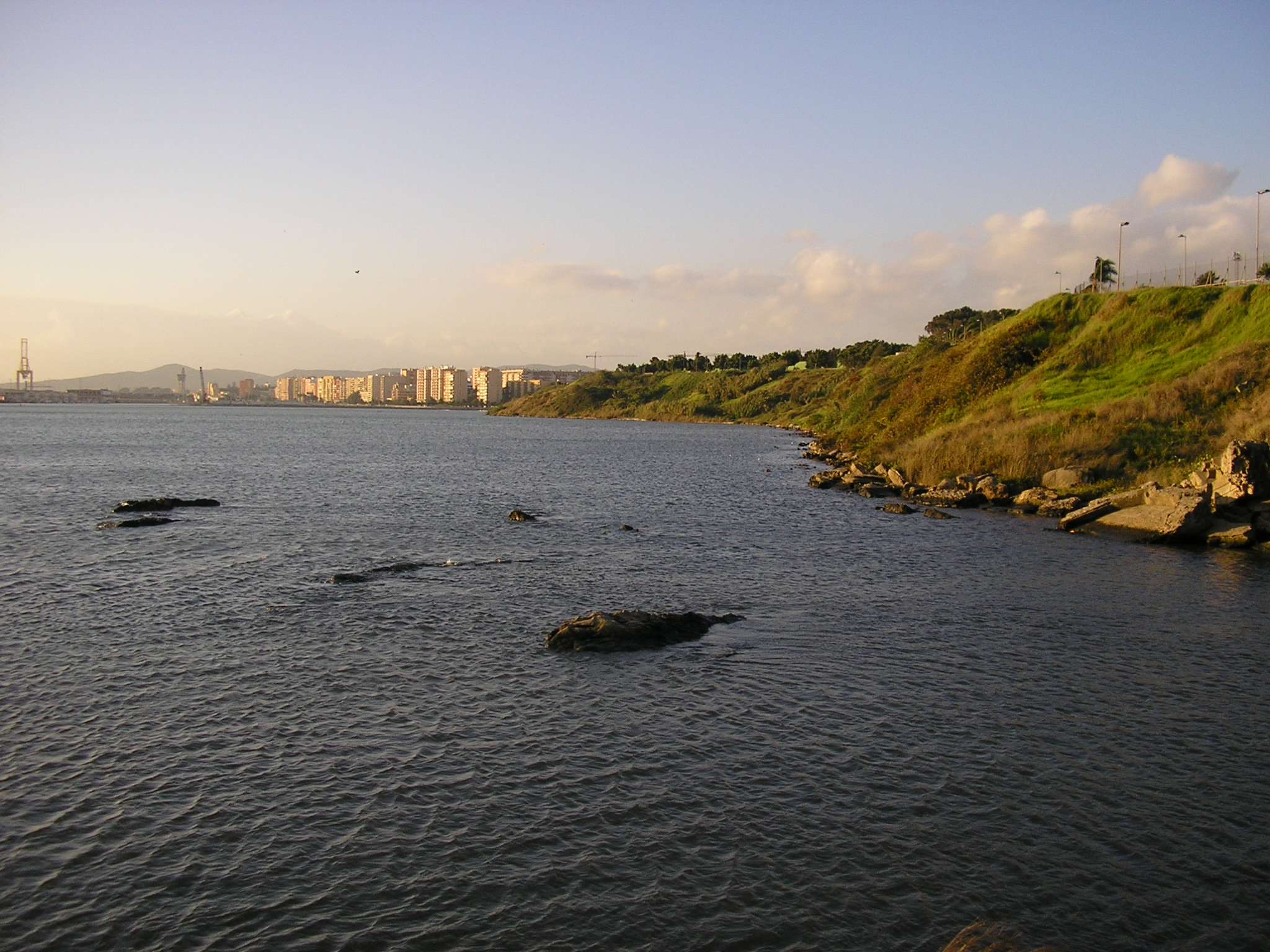 Punta de los Paredones de Algeciras Fotografía de realización propia, noviembre de 2007